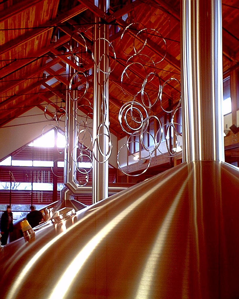 IMG_0001_newbelgium